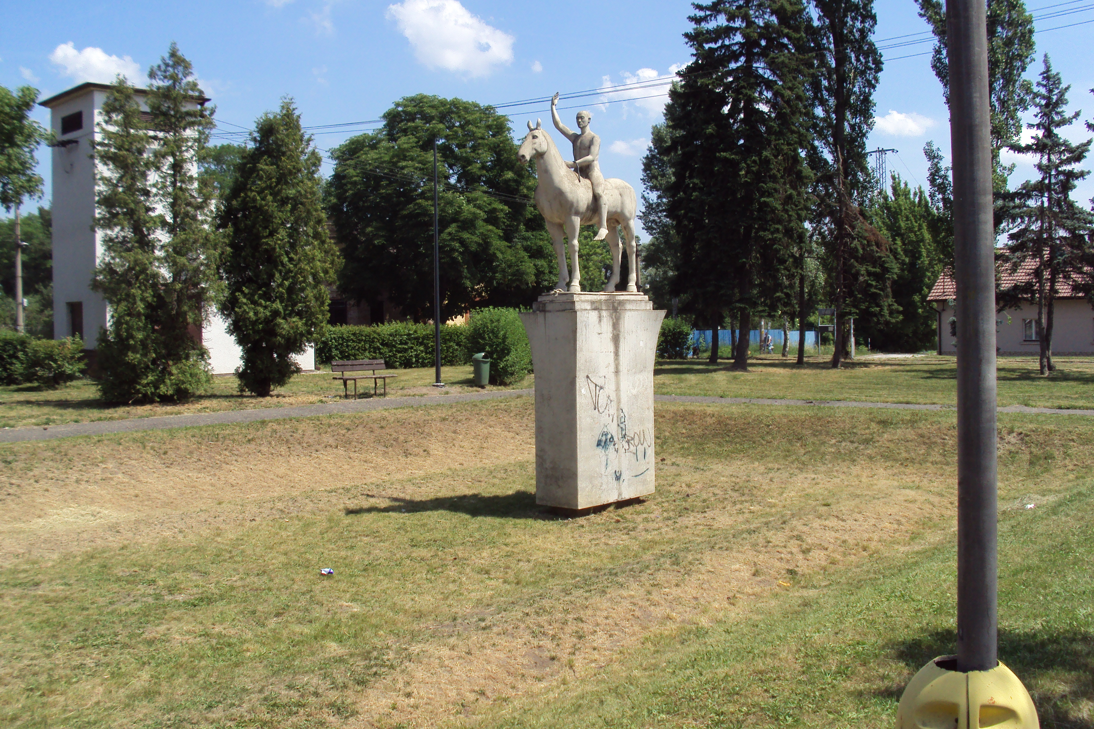 Jezdecká socha v Kostomlatského sadech, Neratovice